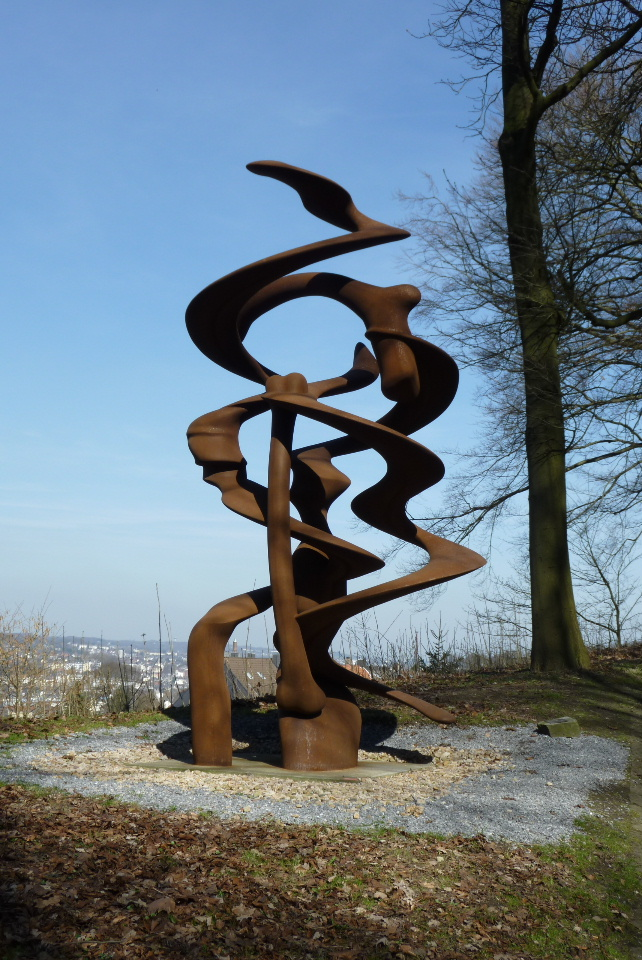 Tony Cragg: "To the knee" (2008)) - Skulpturenpark Waldfrieden in Wuppertal